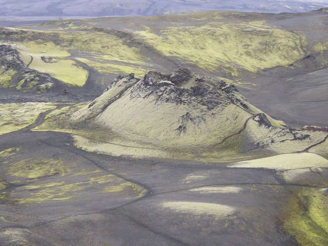 Lakagígar, Iceland